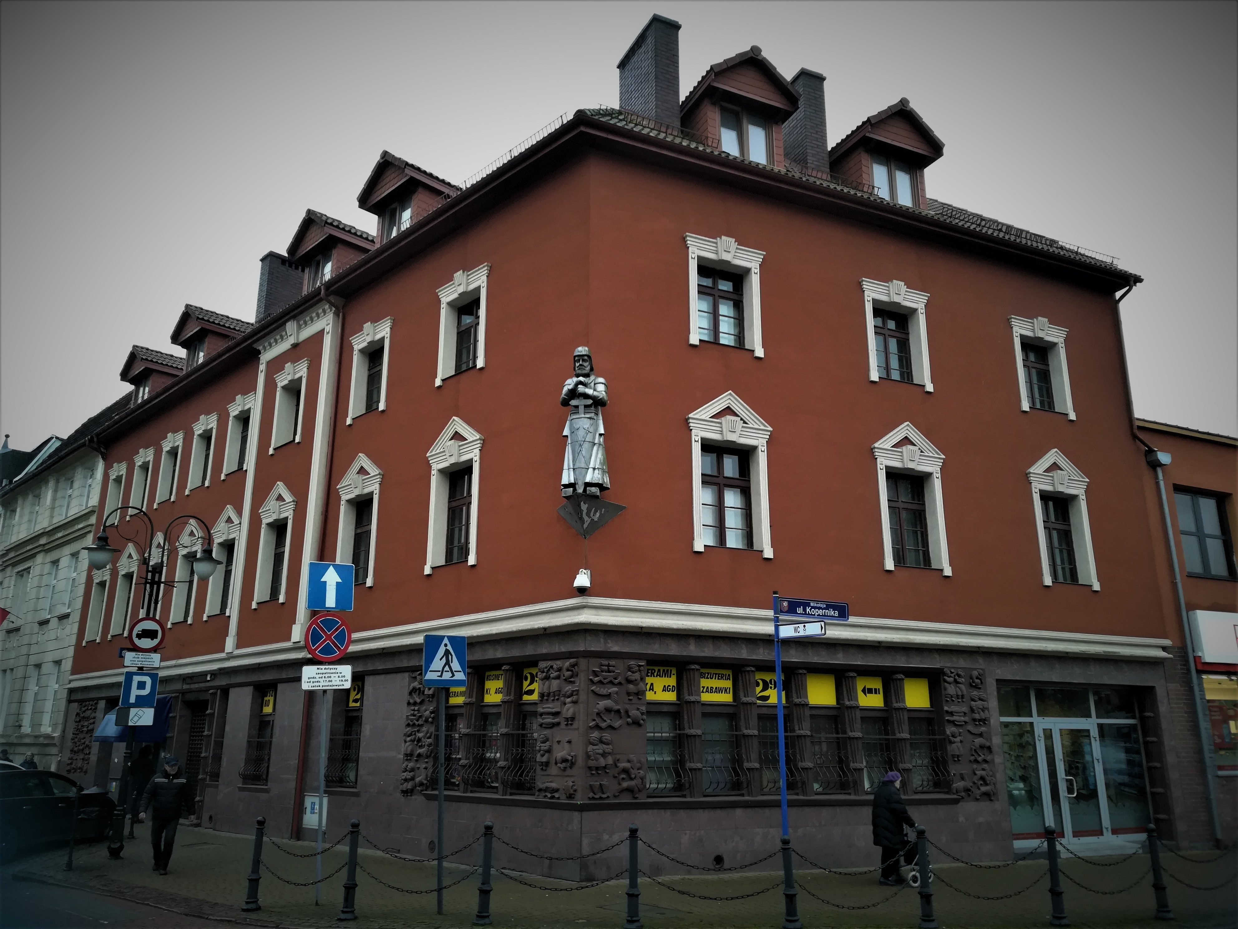 Widok miejski ze Sławna.